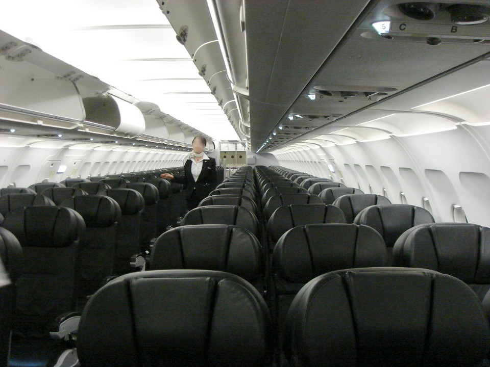 スターフライヤーで運航されているエアバスA320の客室 2006年8月30日に北九州空港発東京国際空港 (羽田空港)行きSFJ88便内で羽田空港到着後降車中に↑ＰＯＮが撮影